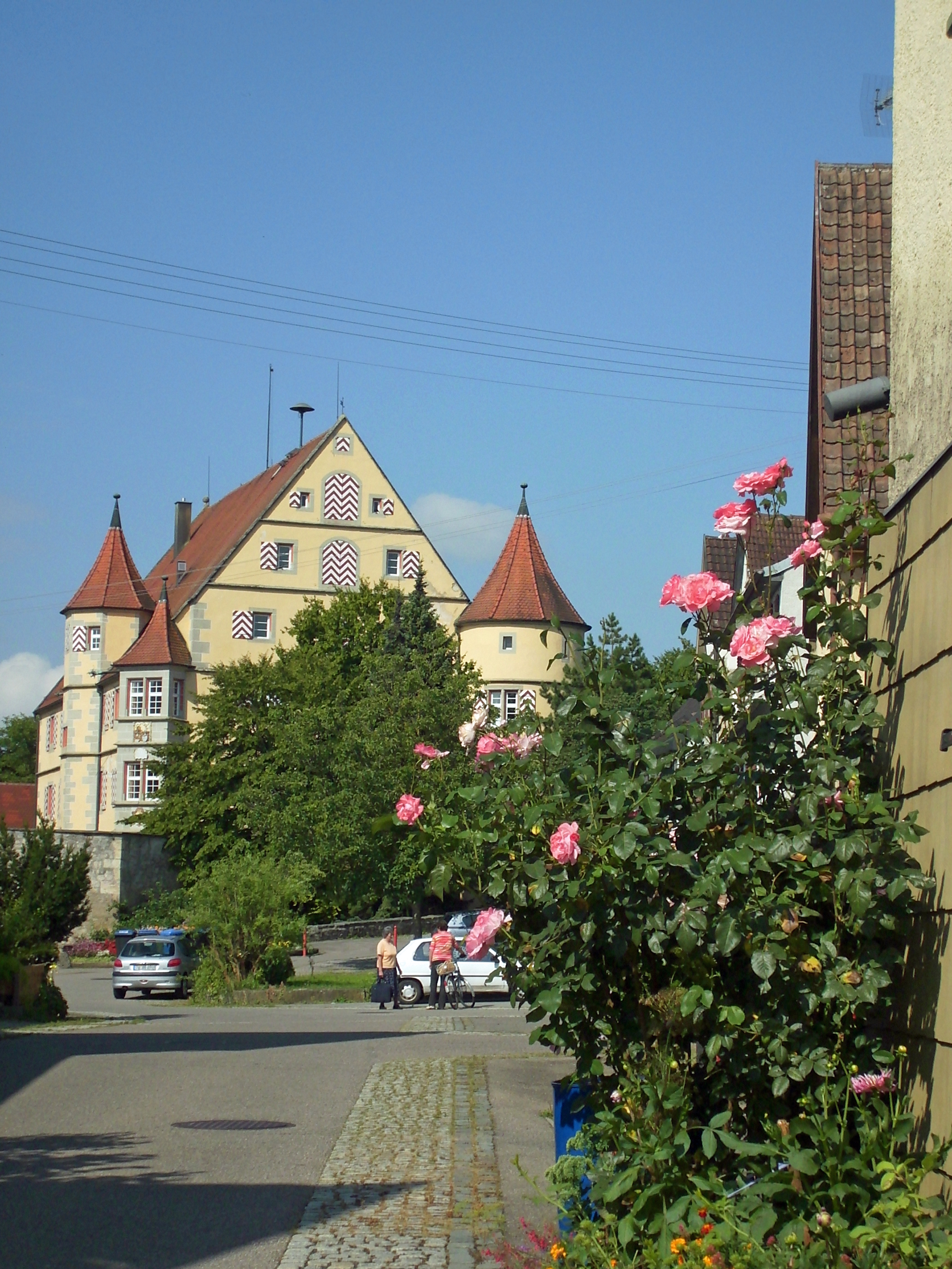 Hirrlingen Schloss Hirrlingen